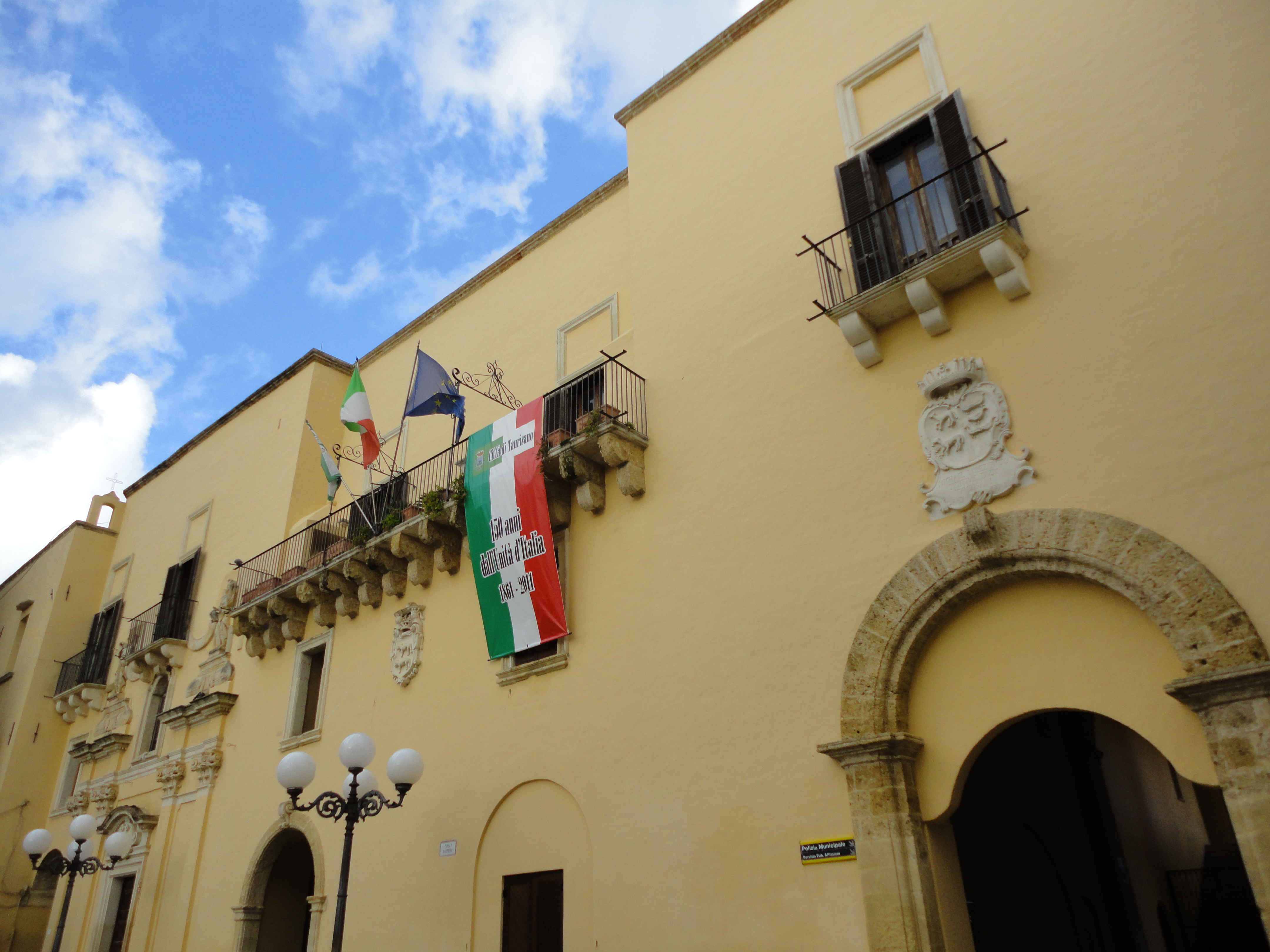 Palazzo Ducale Taurisano, Lecce